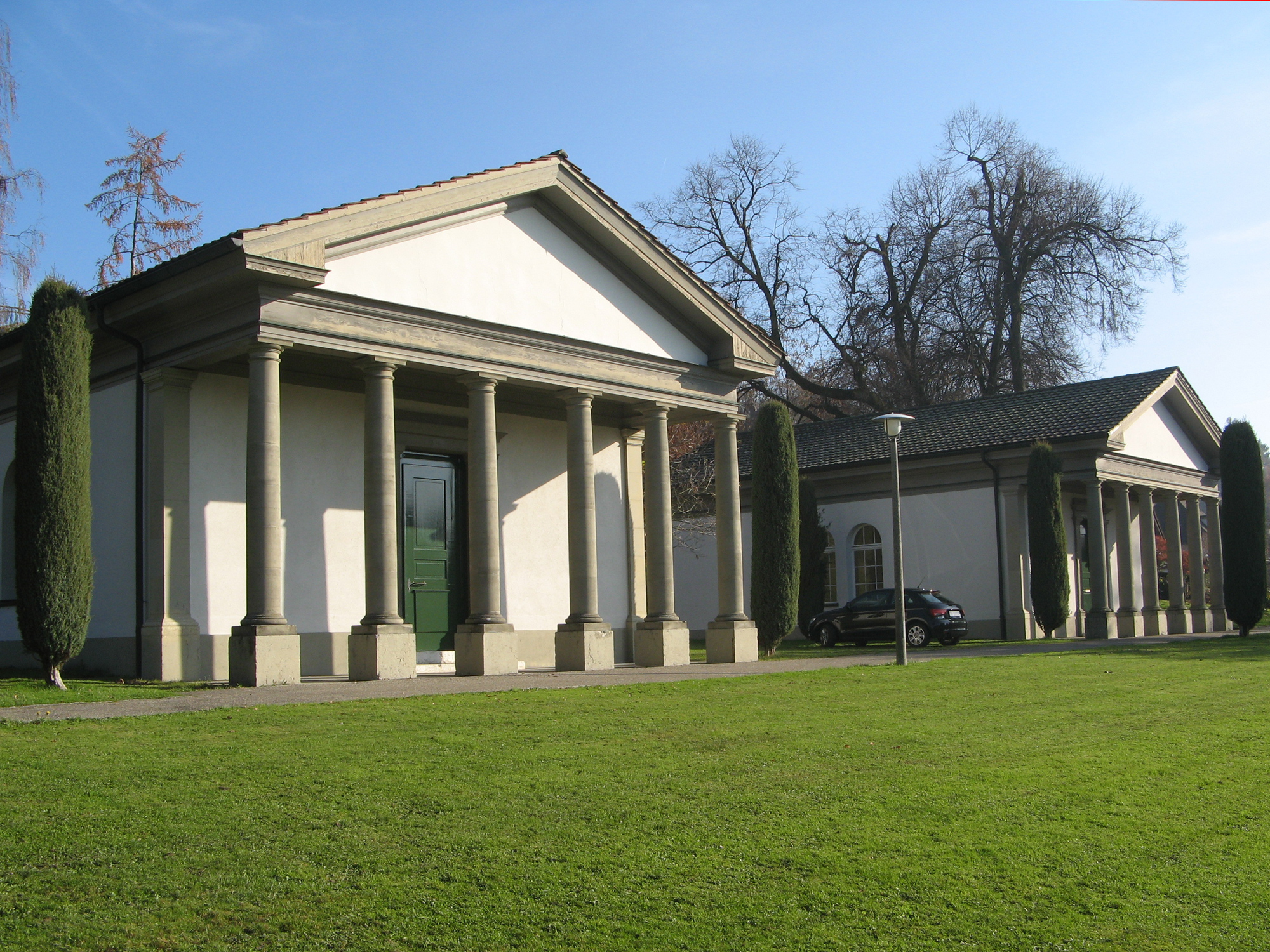 Villa rustica von Zofingen, klassizistische Schutzbauten von 1830/31 zum Erhalt der Mosaikfussböden